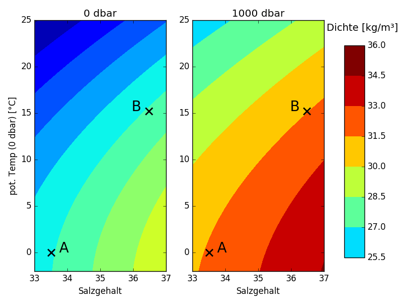 Dichte von (Meeres-)wasser als Funktion von potentieller Temperatur und Salinität bei unterschiedlichem Druck Bei 0 dbar ist die Dichte an Punkt A geringer als an Punkt B. Bei 1000 dbar ist die Dichte an Punkt A größer als an Punkt B. Um die potentielle Dichte an Punkt A und B zu vergleichen, muss ein geeigneter Normaldruck gewählt werden, der möglichst nah am In-situ-Druck liegen sollte.